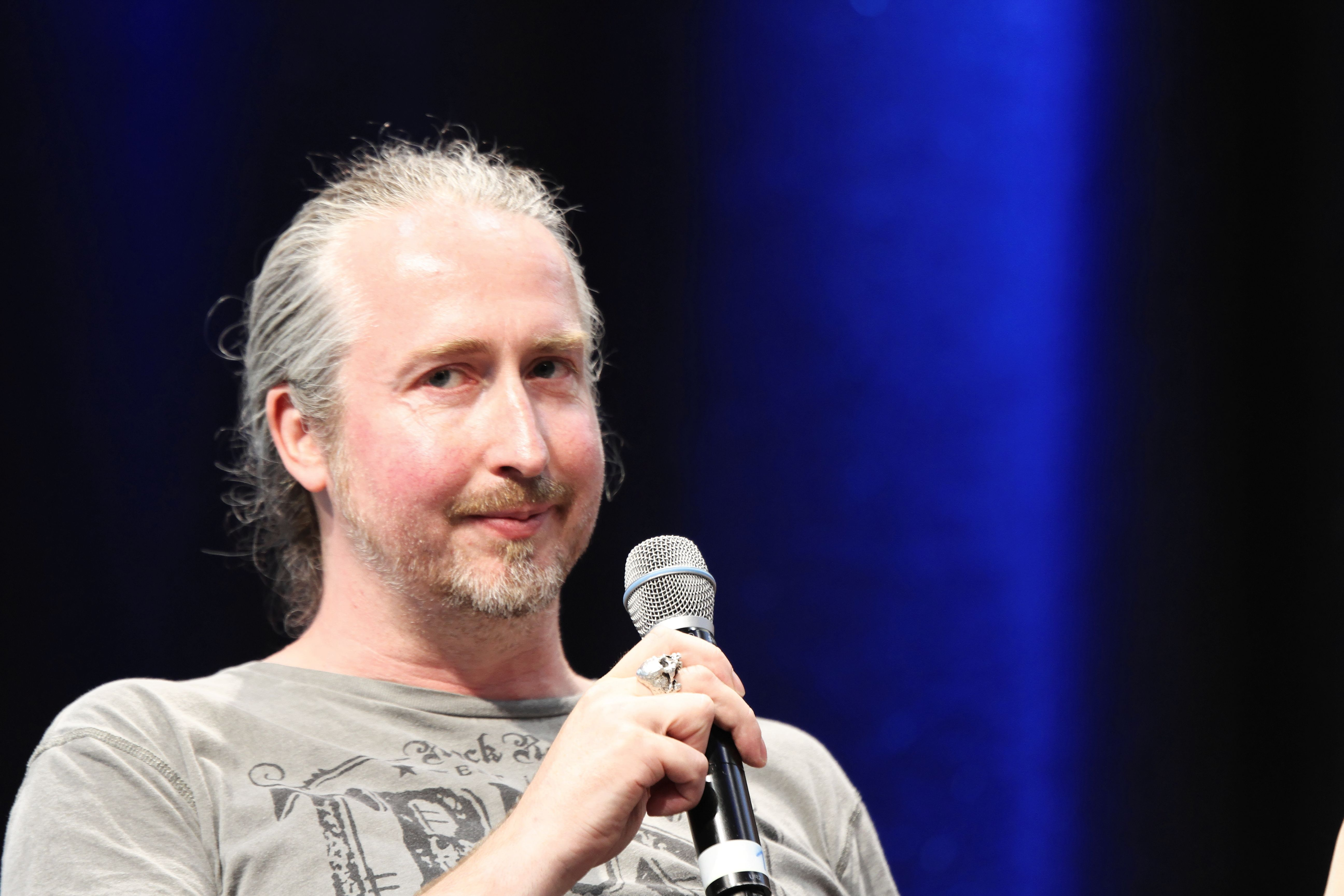 Bilder von der Comic Con Germany 2019 in Stuttgart